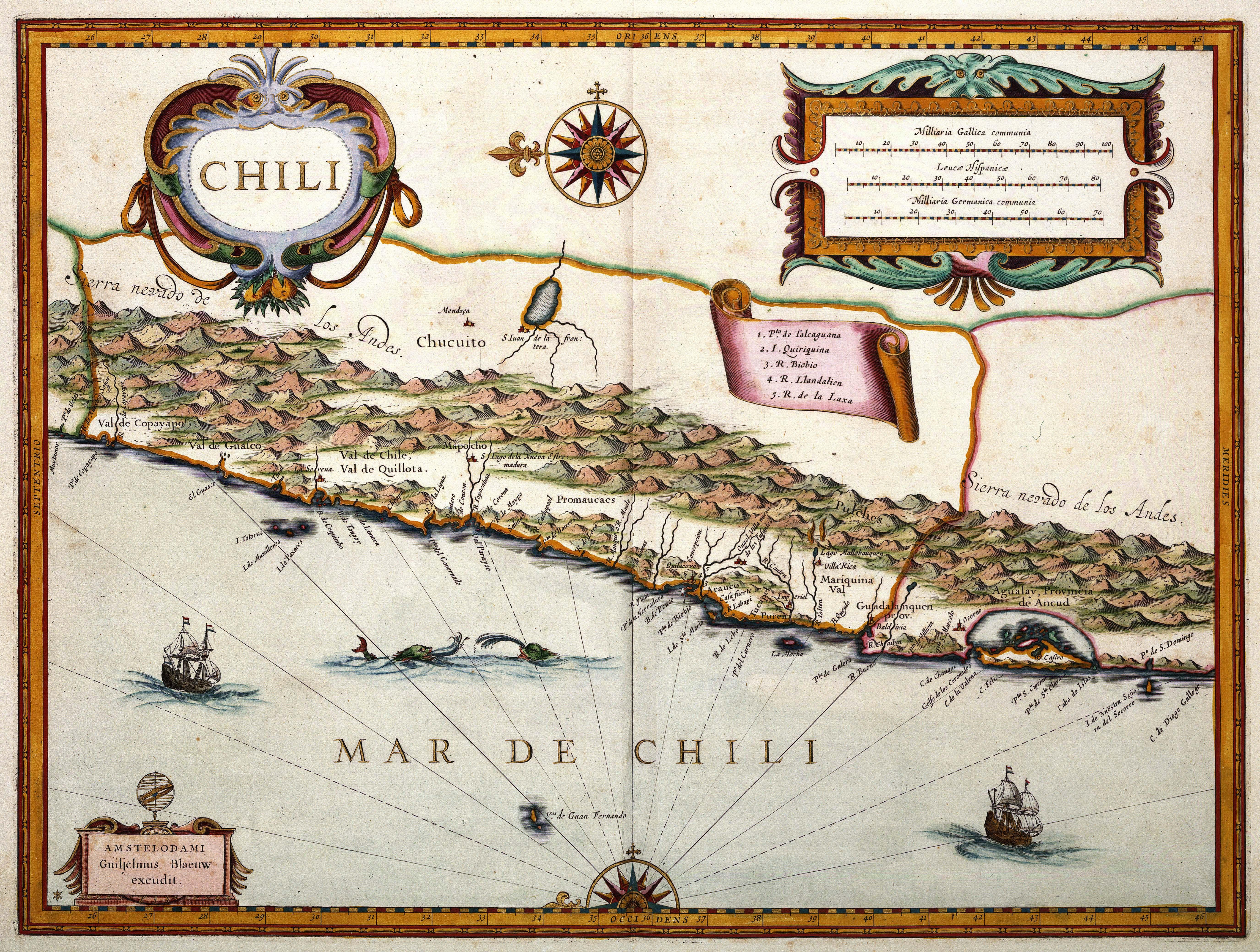 Willem Jansz. Blaeu (1571-1638) publiceerde deze kaart van Chili in zijn Appendix atlas uit 1630. De gegevens voor het samenstellen van deze kaart, èn alle andere kaarten van Zuid-Amerika in de atlas, nam Blaeu over aan Johannes de Laets (1583-1649) Beschrijvinghe van West-Indien uit 1625.